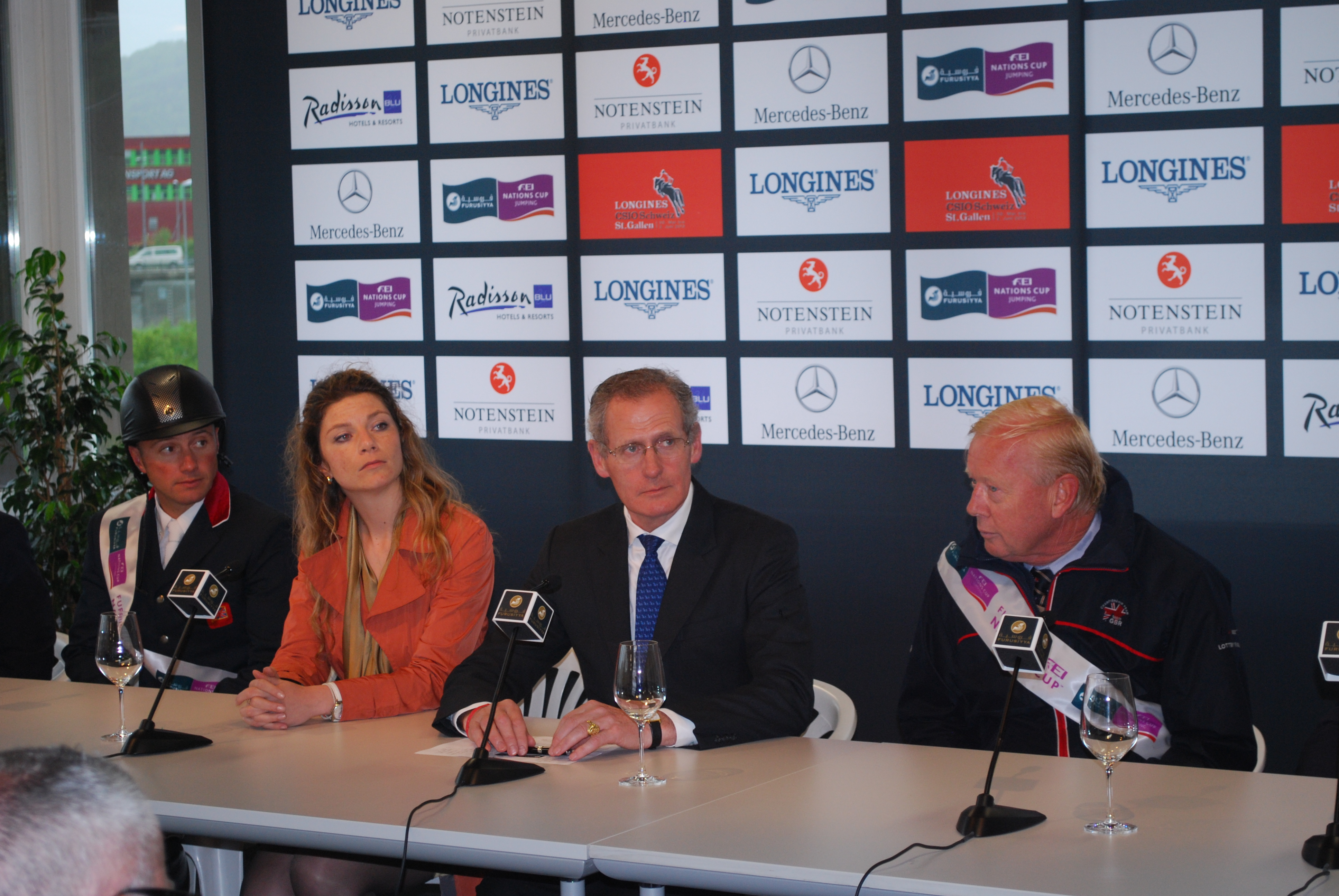 Pressekonferenz nach dem Nationenpreis in St. Gallen. Von links nach rechts: Joe Clee (GBR), Nayla Stössel (OK-Präsidentin), John Roche (FEI-Direktor für den Nationenpreis) und Rob Hoeckstra (Equippenchef GBR)